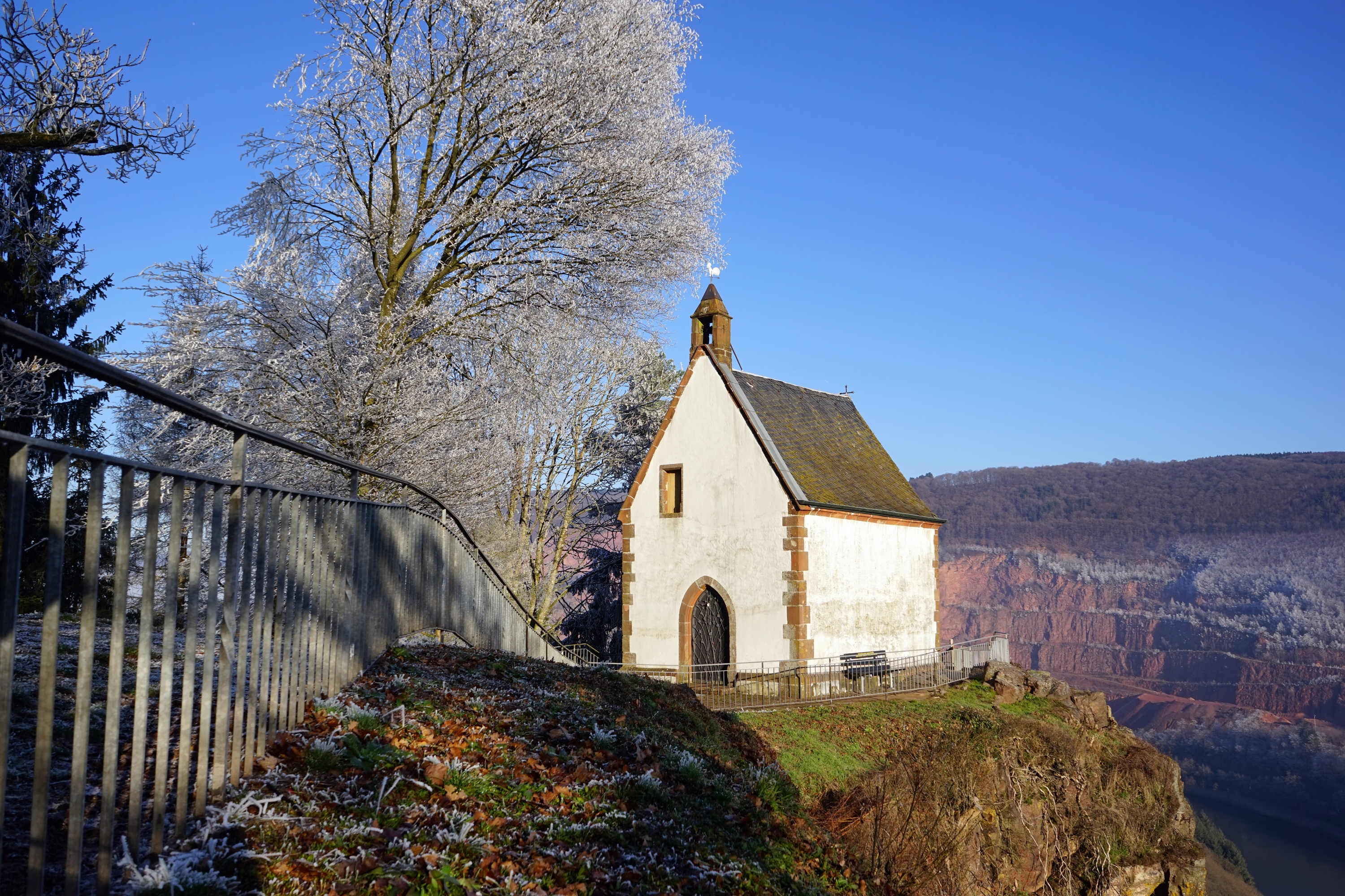 Michaelskapelle bei Taben-Rodt, Ansicht von Westen, im Hintergrund ist das Saartal zu sehen